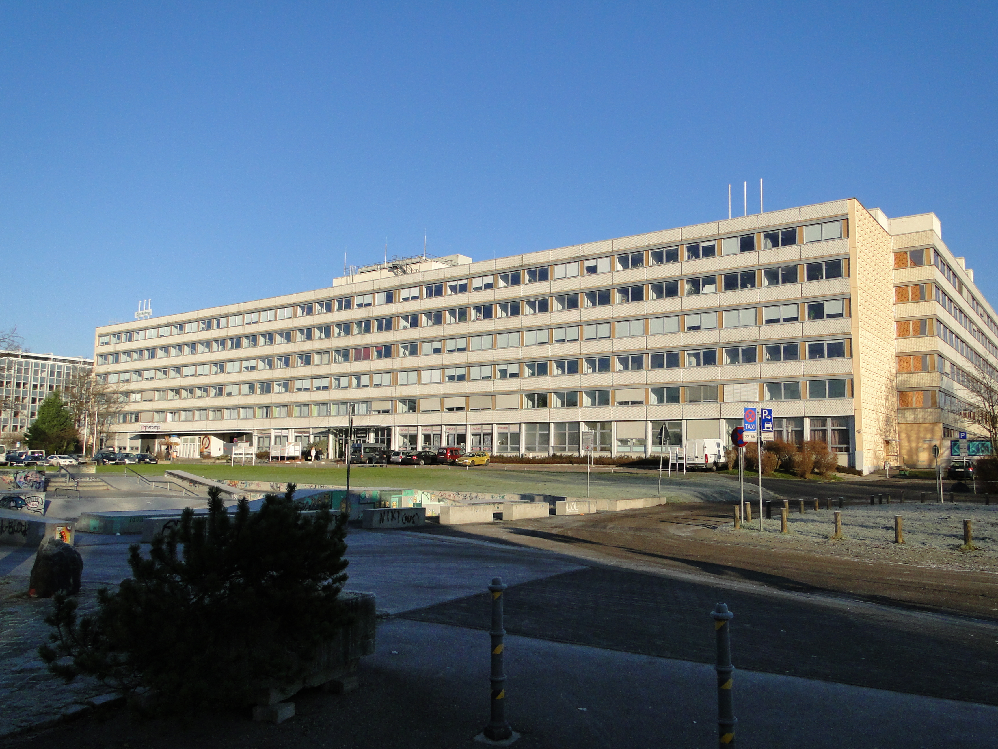 ehem. Robotron-Gebäude auf der Lingnerallee, Dresden